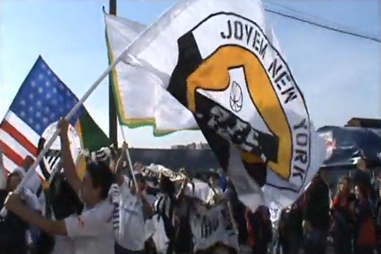 Jovem New York do Santos